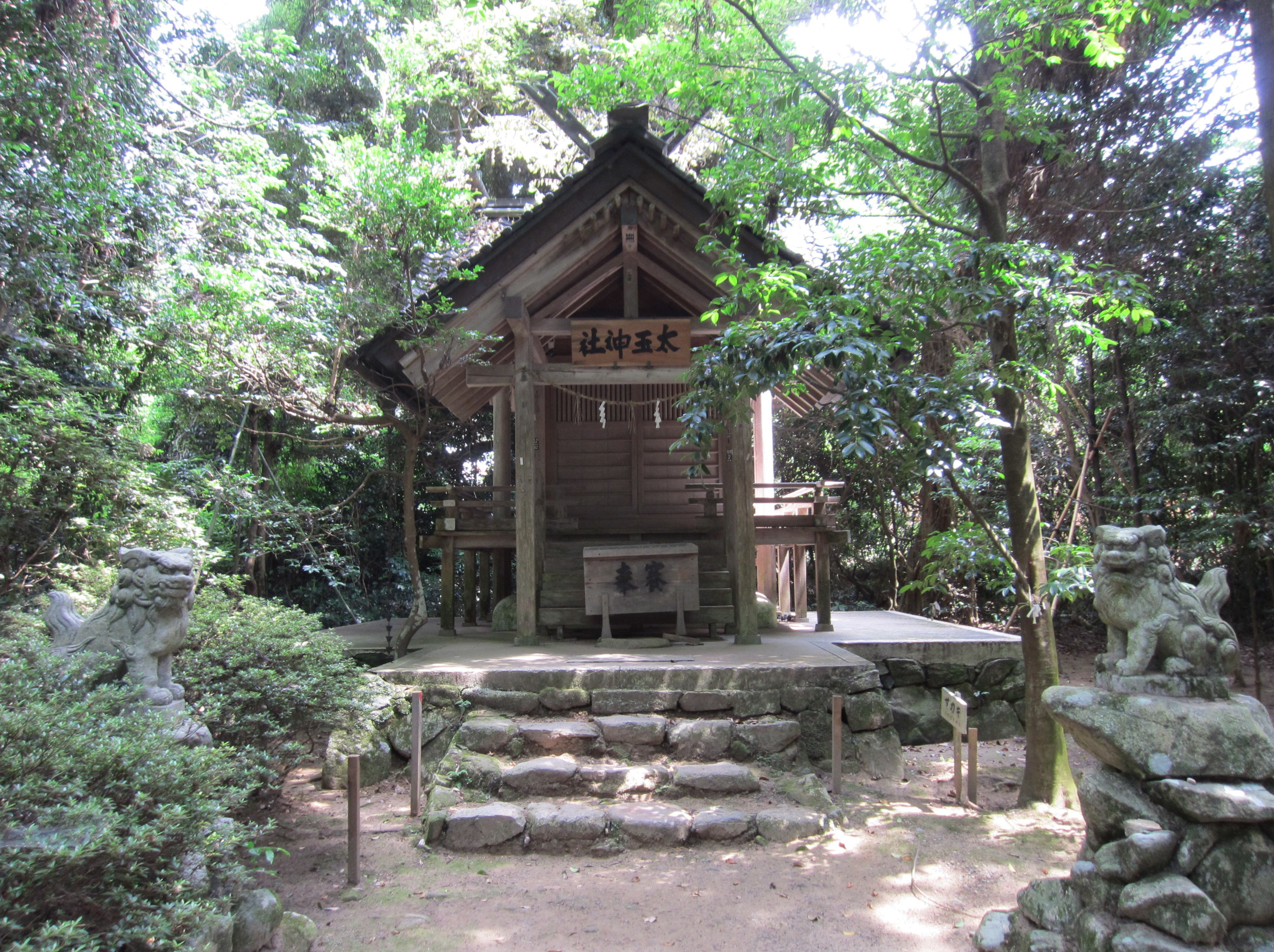 氣多大社 太玉神社